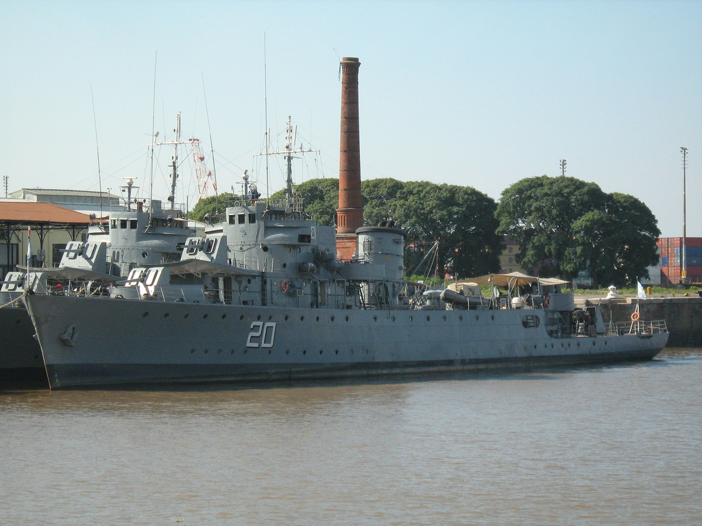 ARA Murature, Buenos Aires, 2010.